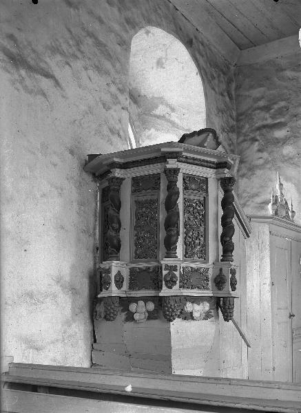 Predikstol, utförd av Olof Tholin, 1715. Kategori: (02) PredikstolarPredikstol, utförd av Olof Tholin, 1715.